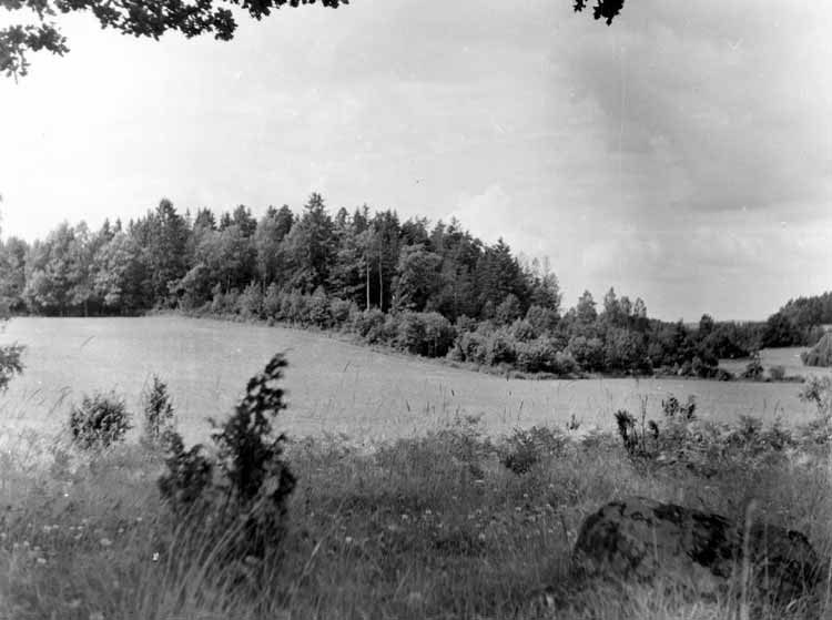 Högby gård i Viksjö. Vy mot Högby gamla gårdsplan från vägen Viksjö-Råsten. Högby var en gård i Viksjö i Järfälla socken, Stockholms län. Av gården återstår ingenting idag. Högby gårdsplats ligger omedelbart norr om Råstensvägen, cirka 700 m från Mälarvägen och i höjd med dagens villakvarter mellan Triangelvägen och Polygonvägen i Viksjö.